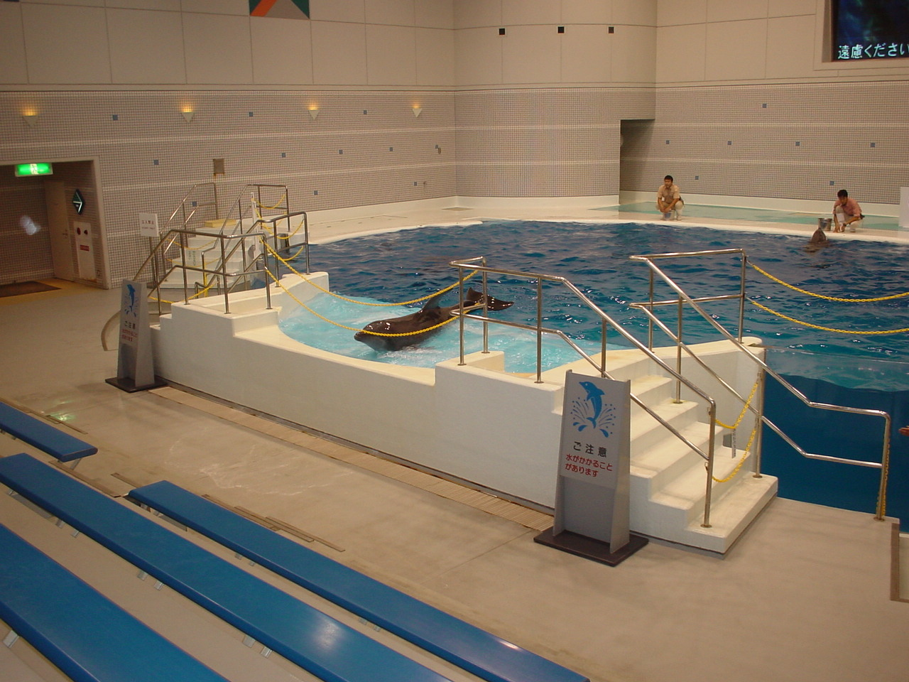 いおワールドかごしま水族館のイルカ水槽の画像。